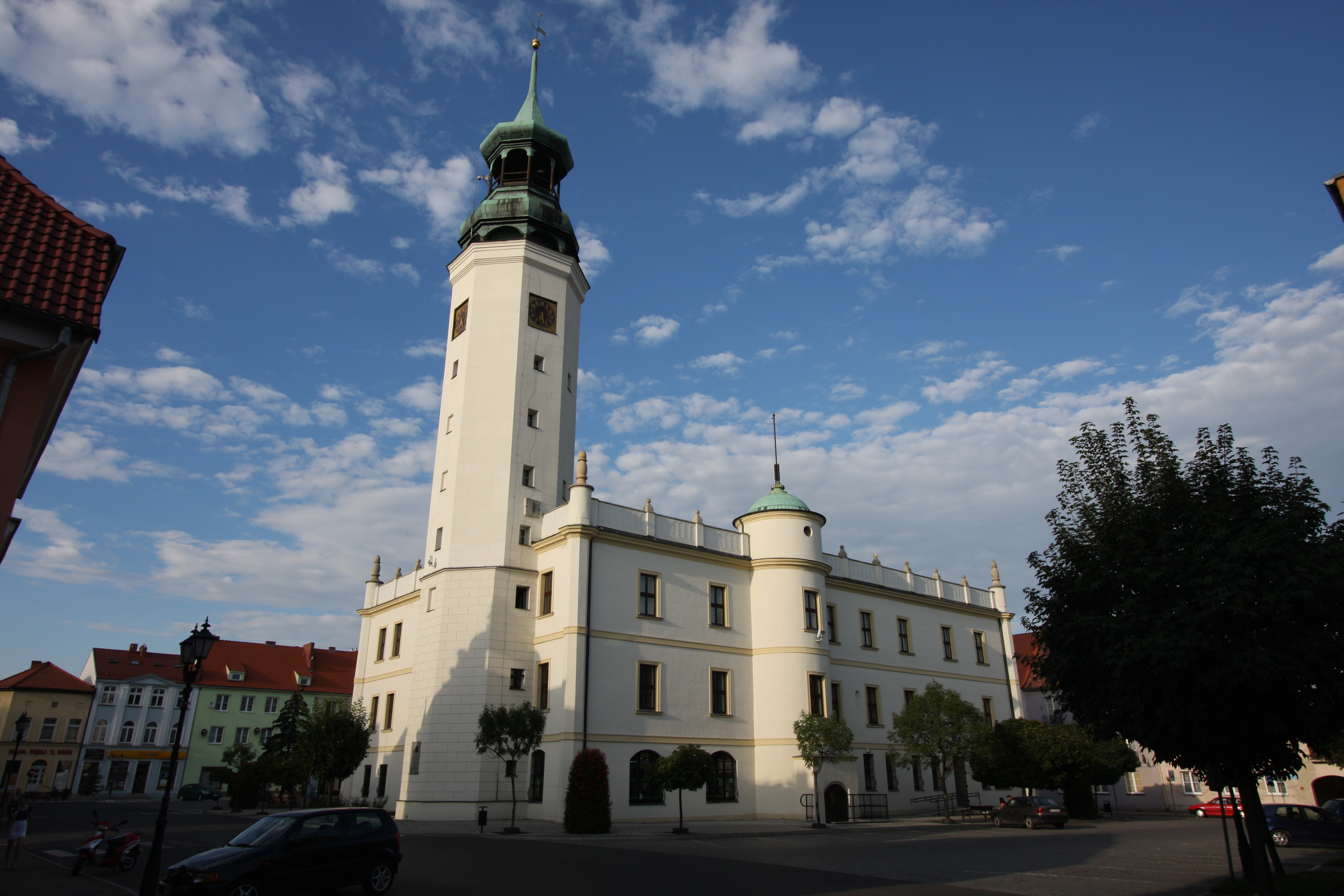 Sulechów, ratusz, mur., XVIII, XIX